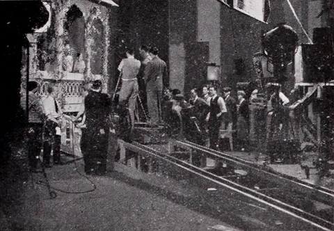 Devika Rani et Himansu Rai sur le tournage de Karma (1932)